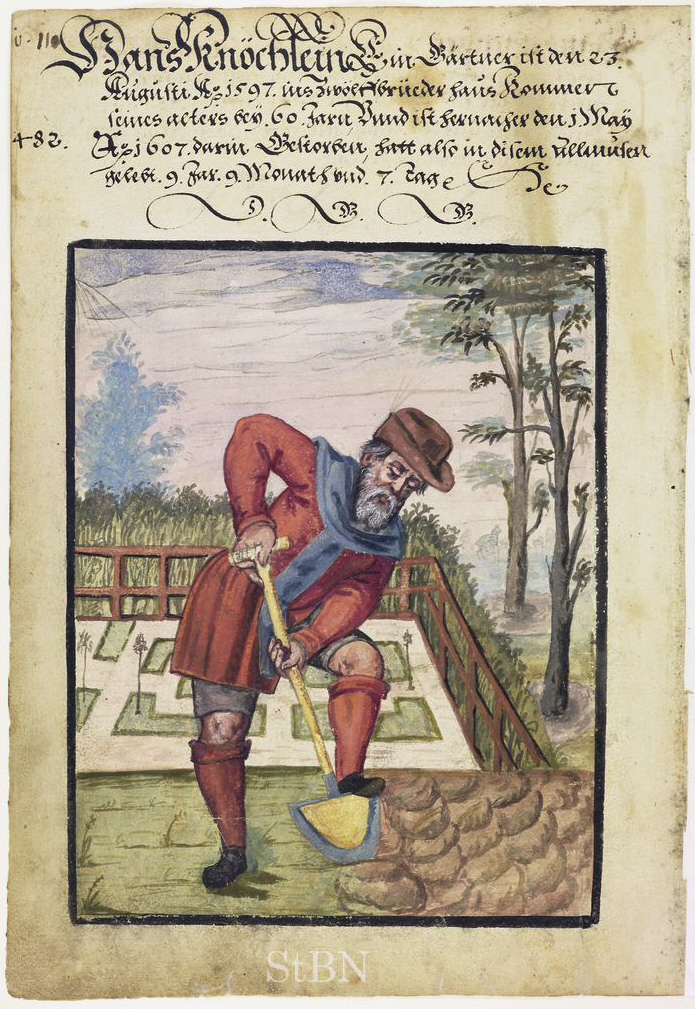 Hans Knöchlein, Gärtner Transkription und weitere Informationen